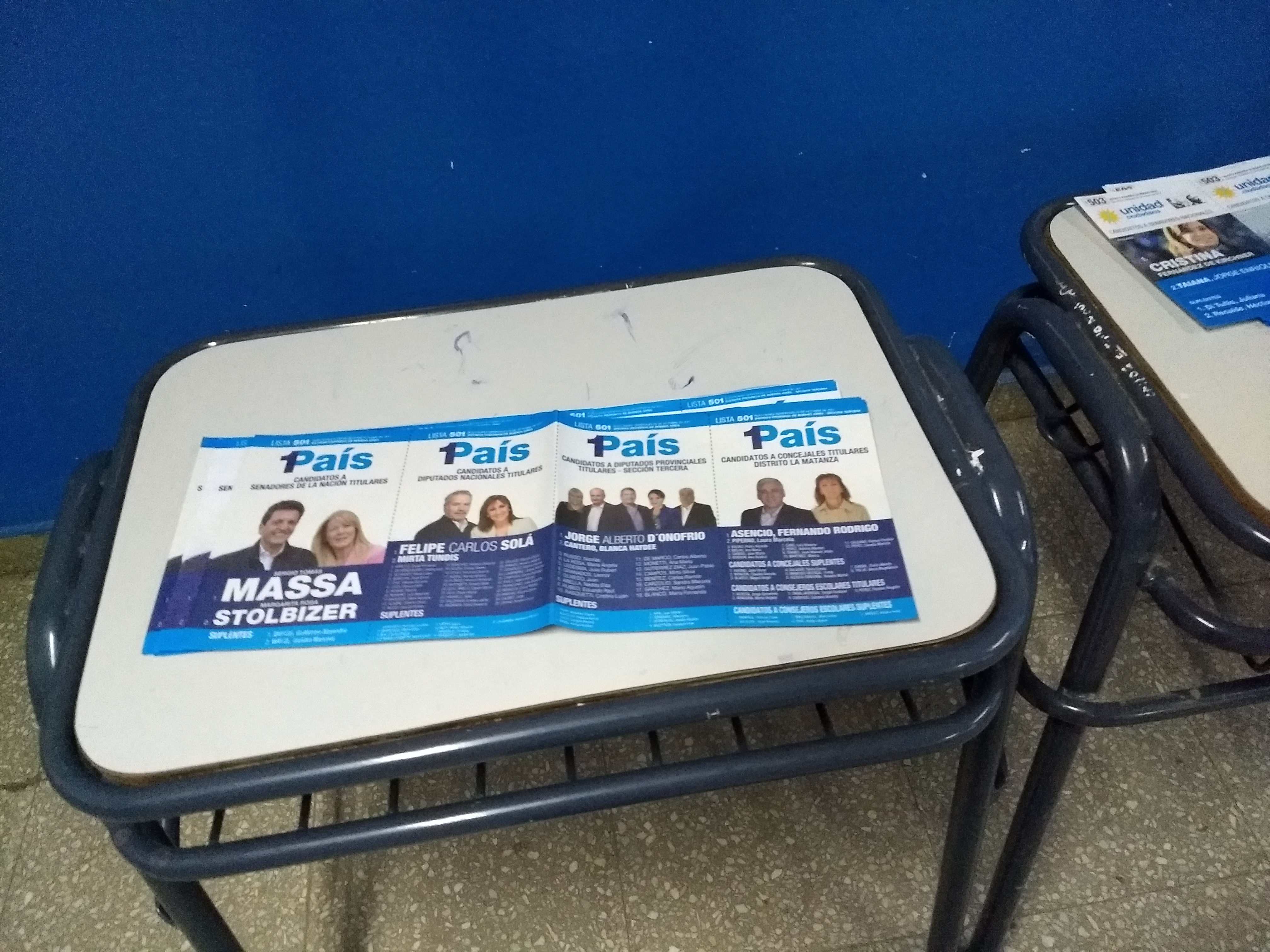 Boletas de 1País, en un cuarto oscuro de la escuela primaria n°184, Rafael Castillo, partido de La Matanza, provincia de Buenos Aires, el día de las elecciones legislativas generales del 22 de octubre de 2017.